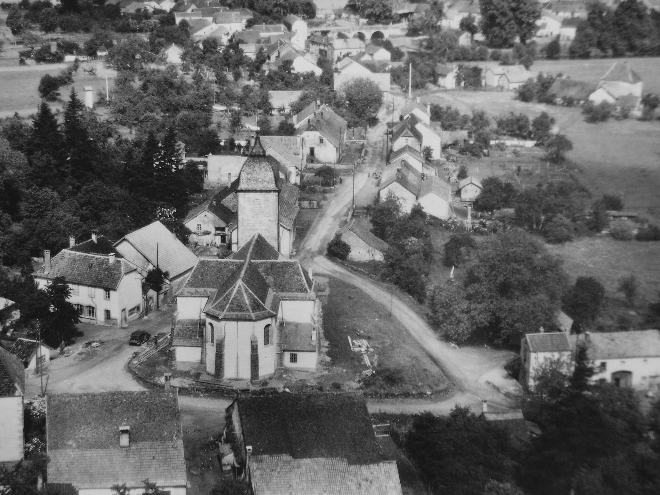 Saint-Barthélemy (Haute-Saône).